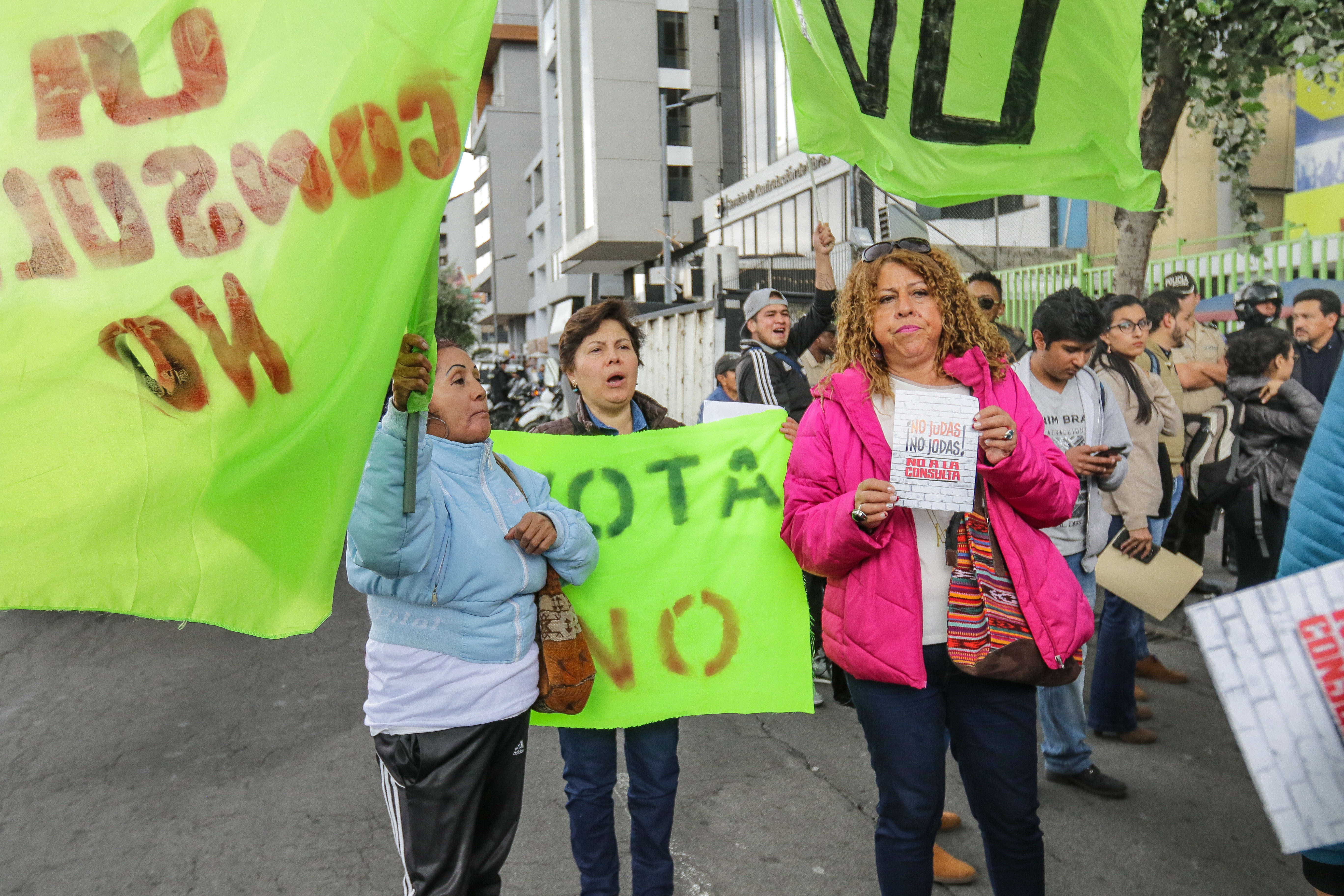 Quito 16 Ene (ANDES).- Asambleístas de Alianza País del ala Correísta se reunieron en los alrededores de su sede central en Quito para anunciar su desafiliación del movimiento. Fotografías: Carlos Rodríguez/Andes.